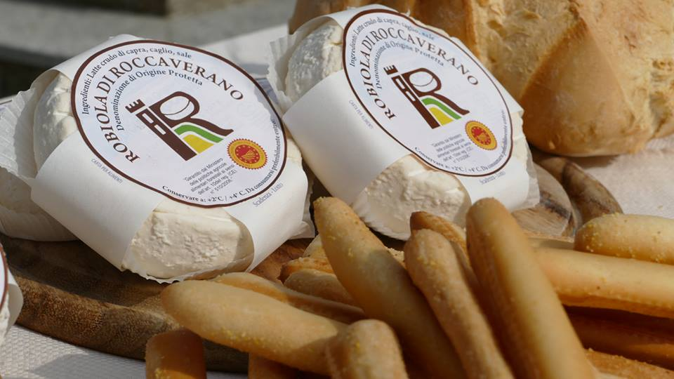 Formaggio a latte crudo di capra